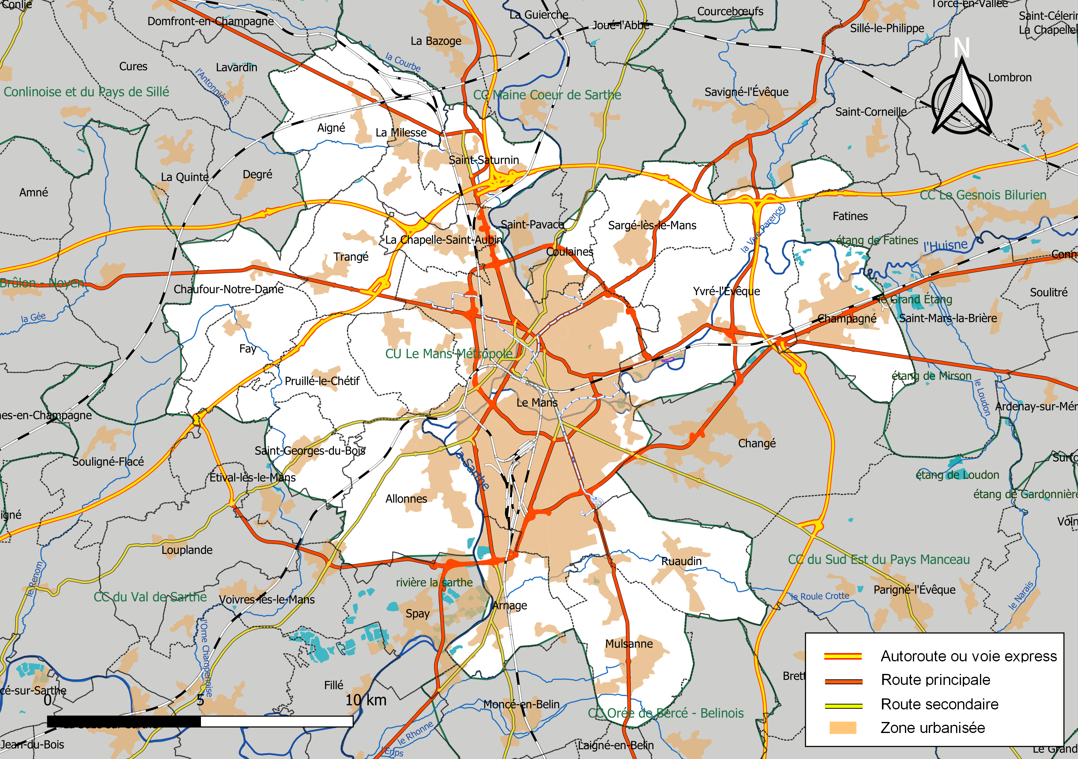 Carte géographique de l'intercommunalité Le Mans Métropole, département de la Sarthe, France. Composition au 1er janvier 2019.